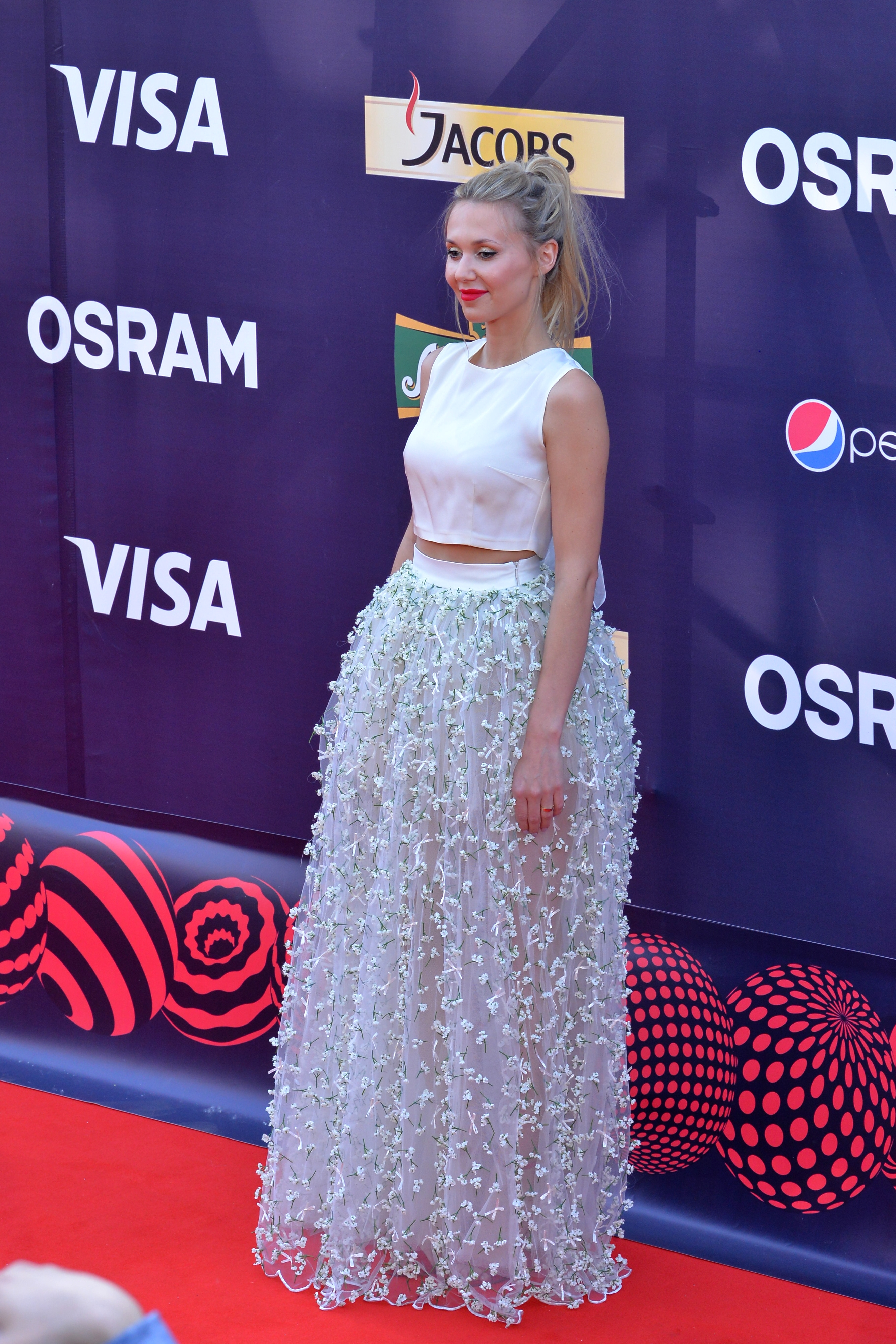 Польська співачка Кася Мось на церемонії відкриття пісенного конкурсу Євробачення 2017 у Києві